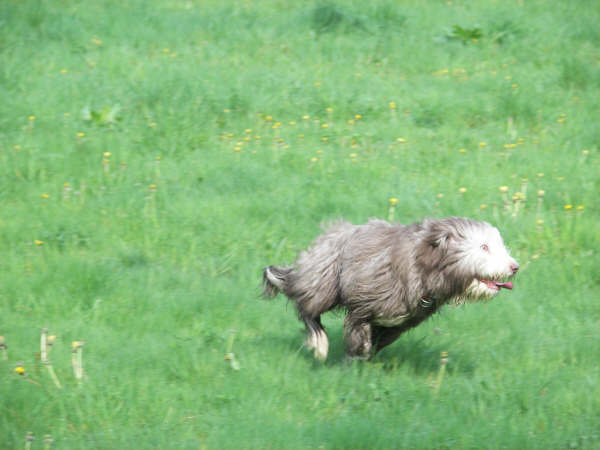 Nani, een fawn bearded collie.